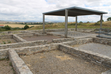 Domus de Pompeia Valentina